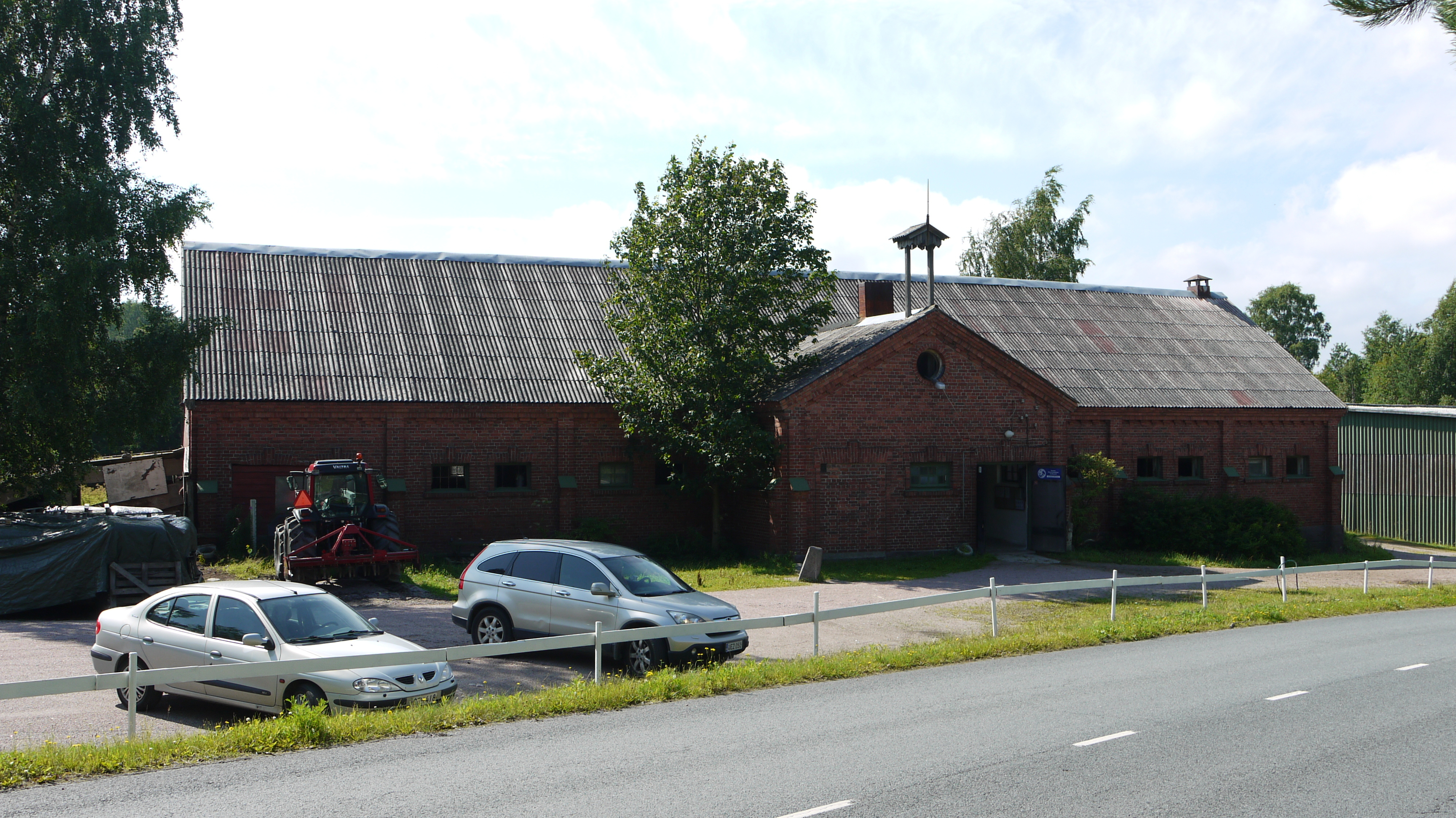 Tapiolan ratsastuskoulun tallirakennus Espoon Otaniemessä